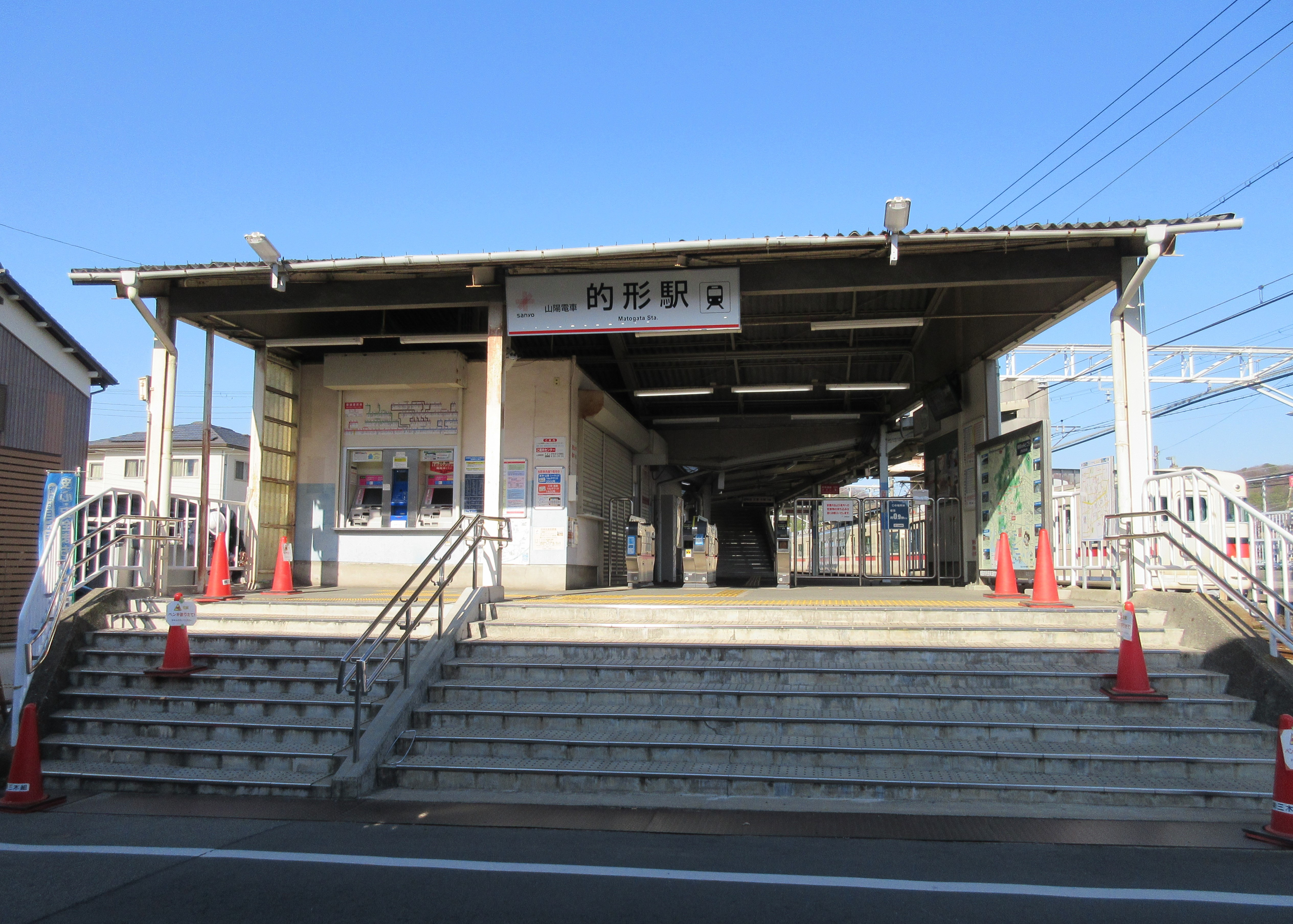 山陽電鉄的形駅